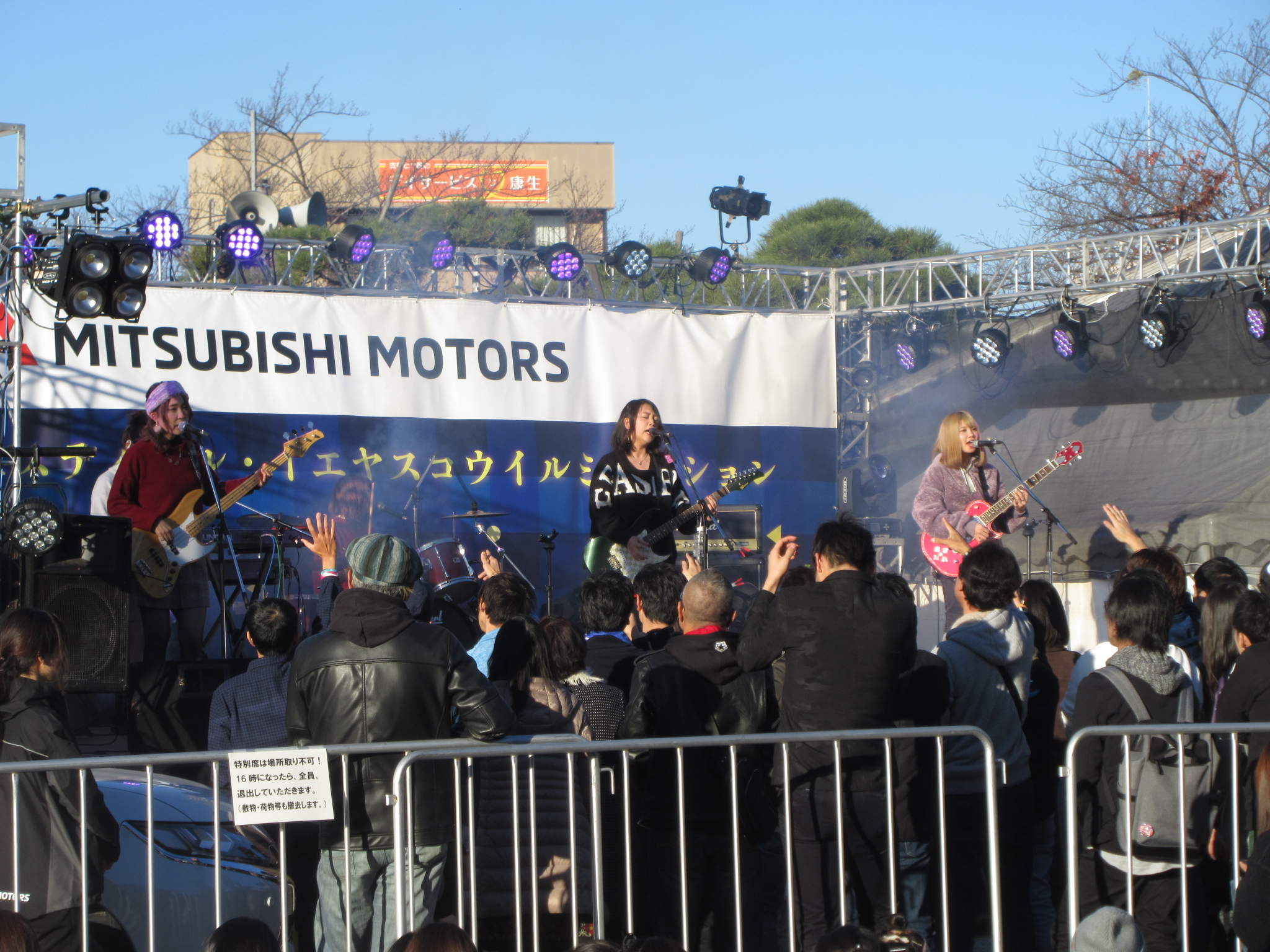 Split BoB。岡崎公園（愛知県岡崎市）で行われたイベント。2018年11月24日撮影。